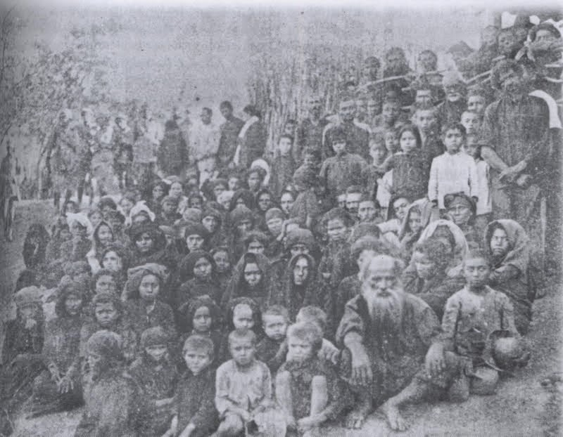 Habitantes do sítio Caldeirão.